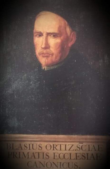 Retrato de D. Blas Ortiz